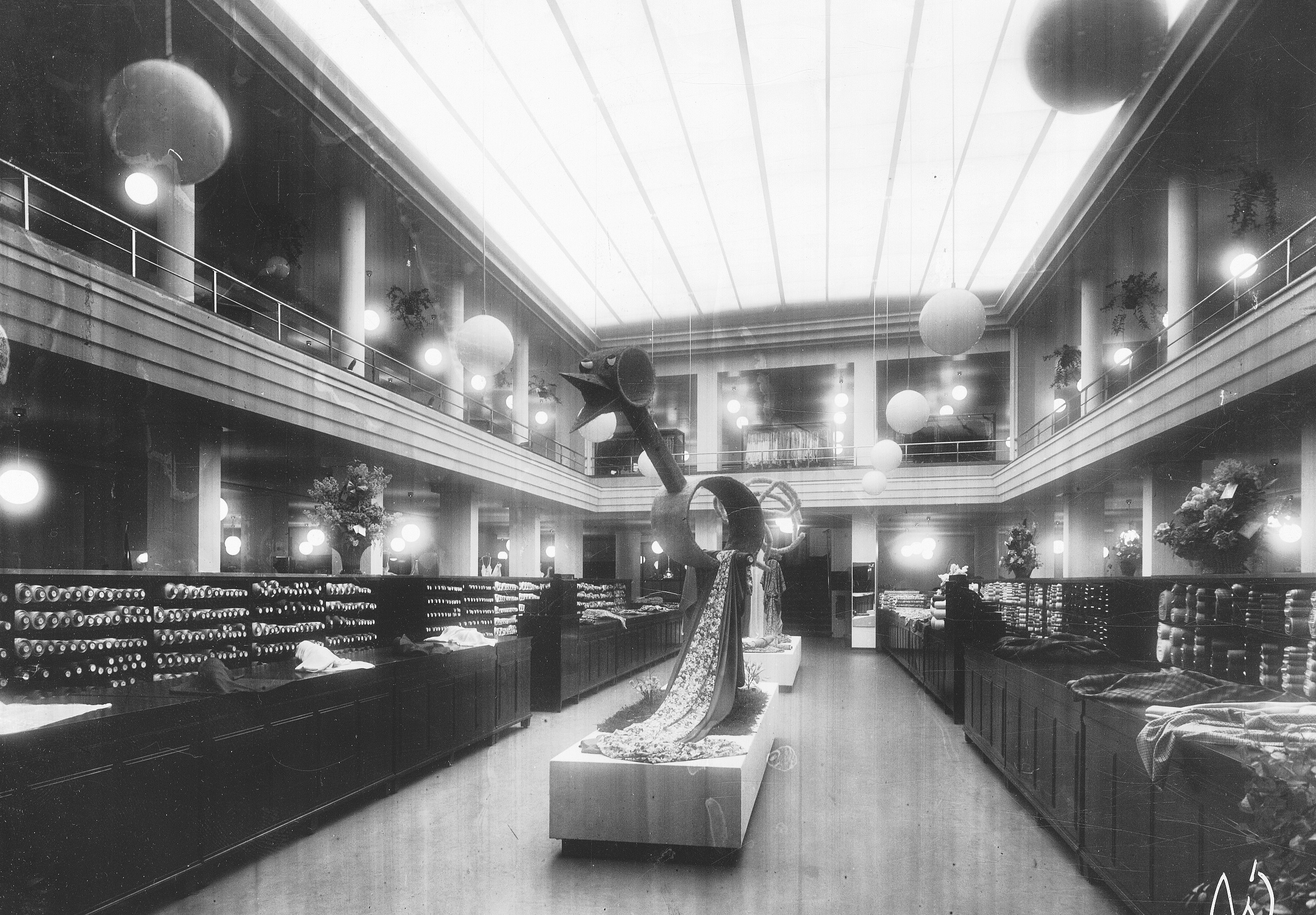 Varuhuset Meeths vid Kungsgatan